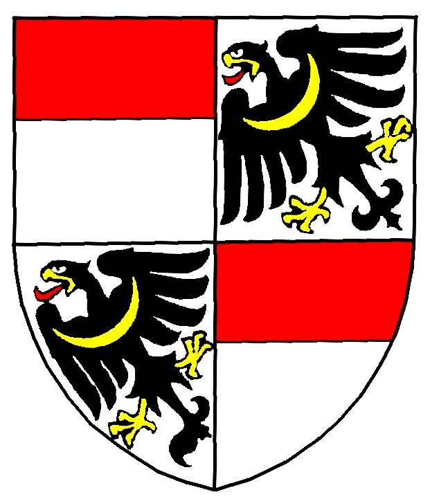 Erb Hasištejnských z Lobkovic